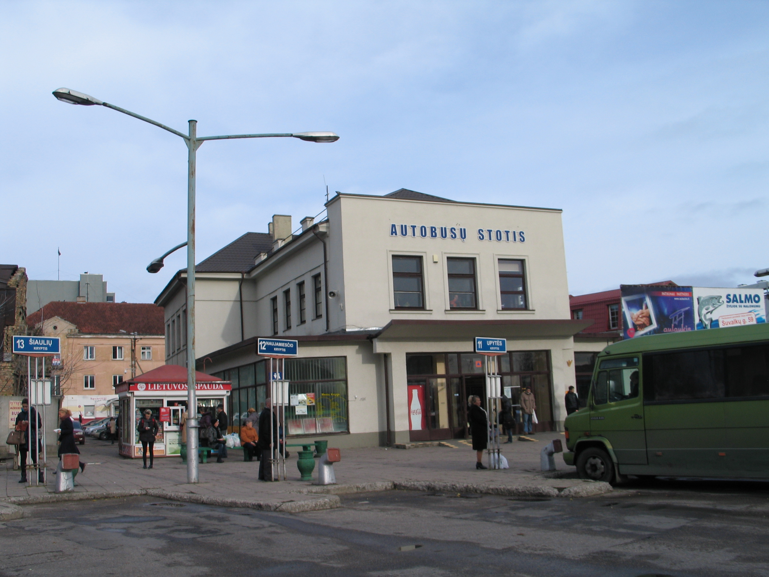 Автостанция в Паневежисе